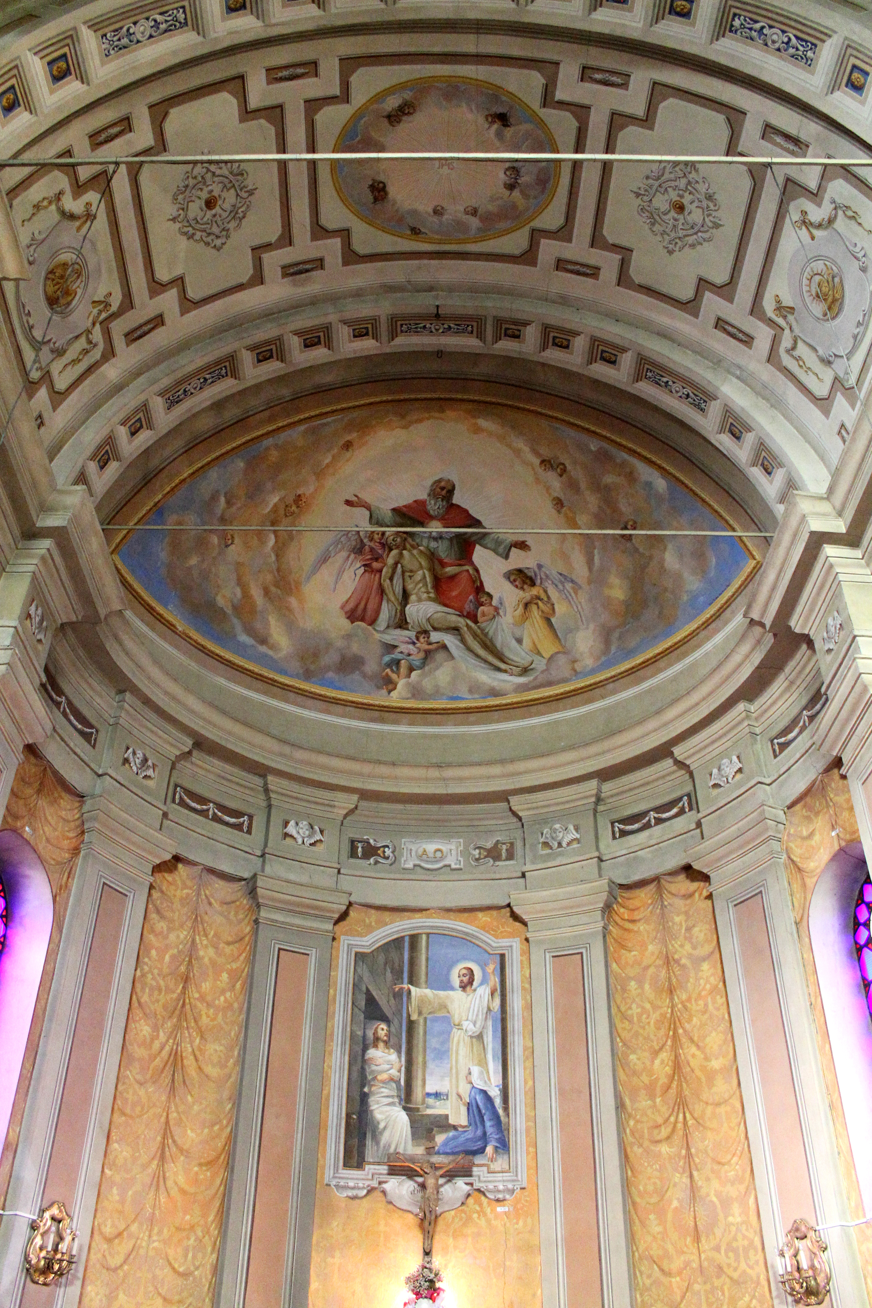 San Lazzaro di Sarzana, frazione di Sarzana: la chiesa di San Lazzaro, interno, affreschi dell'abside.